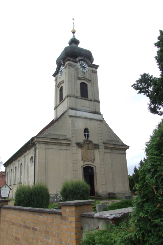 Village Church in Reckahn, western side